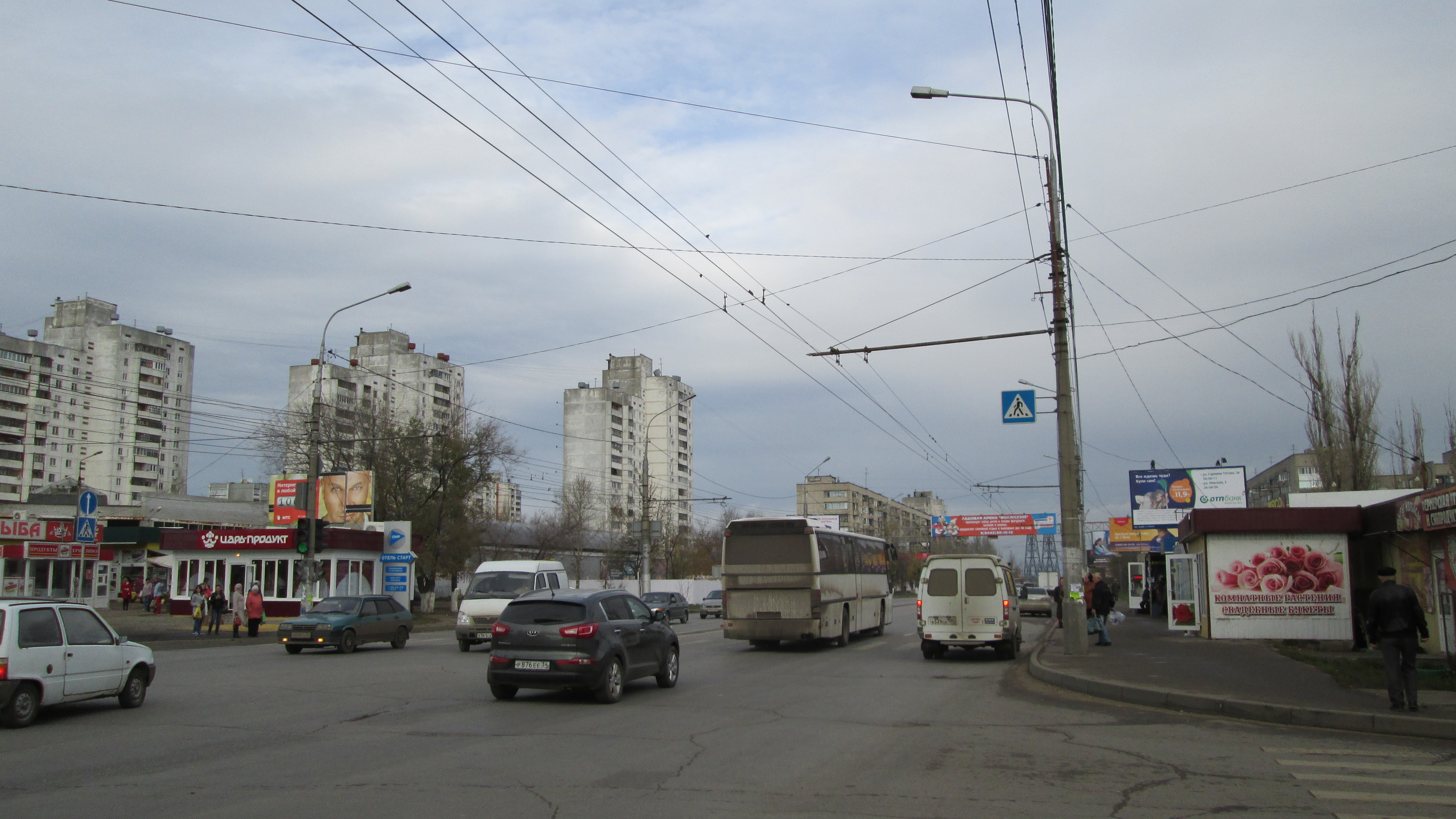 Ул. Николая Отрады